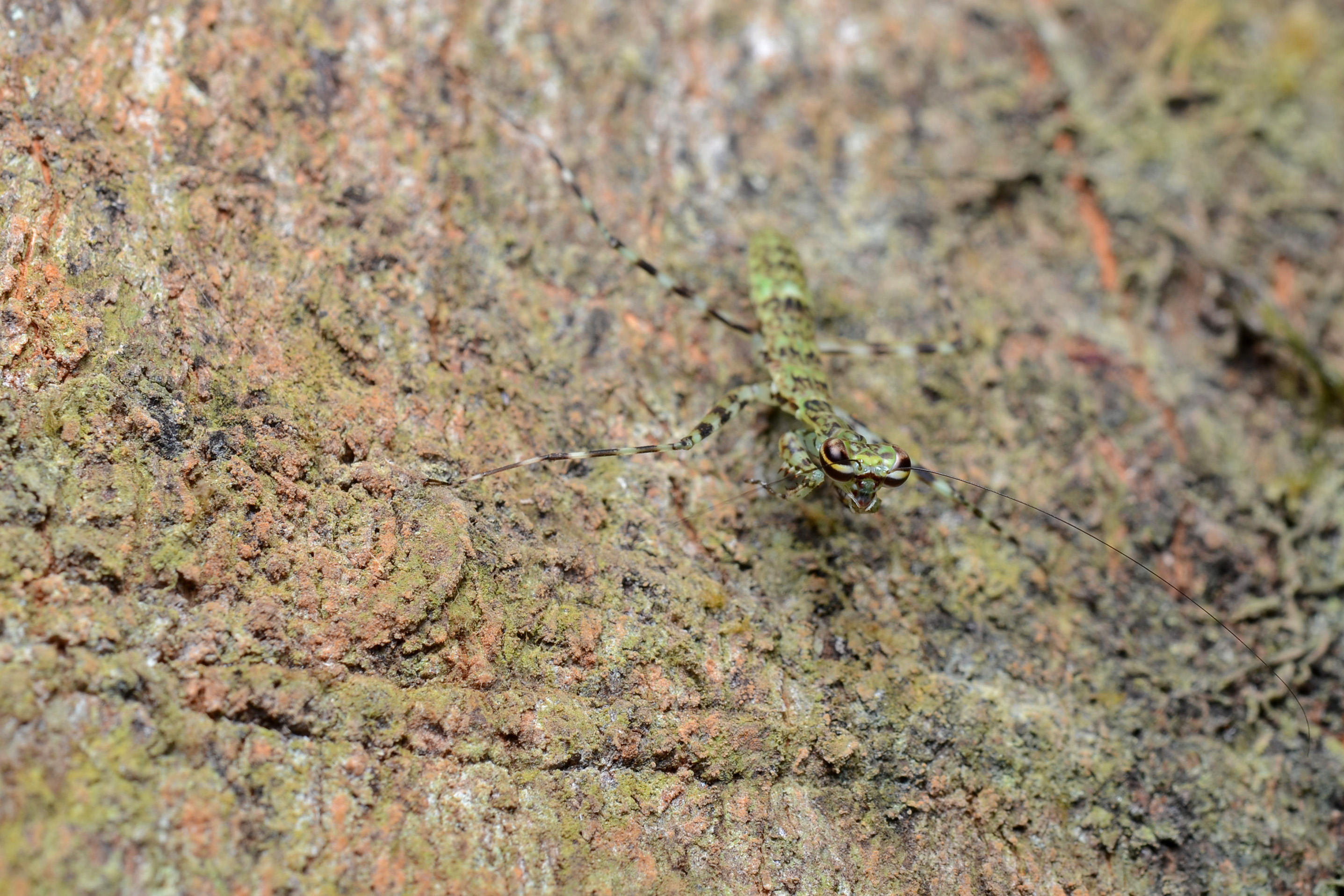 Mantidae: Liturgusinae: Liturgusa sp.